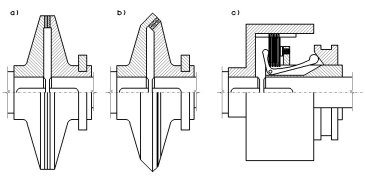 Sprzęgło poślizgowe